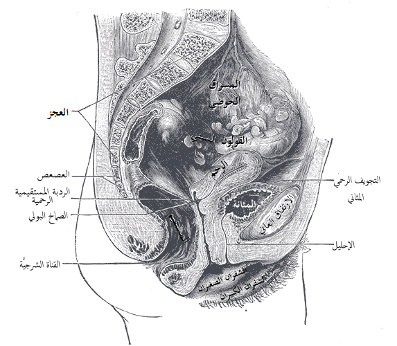 مقطع عرضي يُظهرُ الأعضاء الداخليَّة في حوض المرأة.